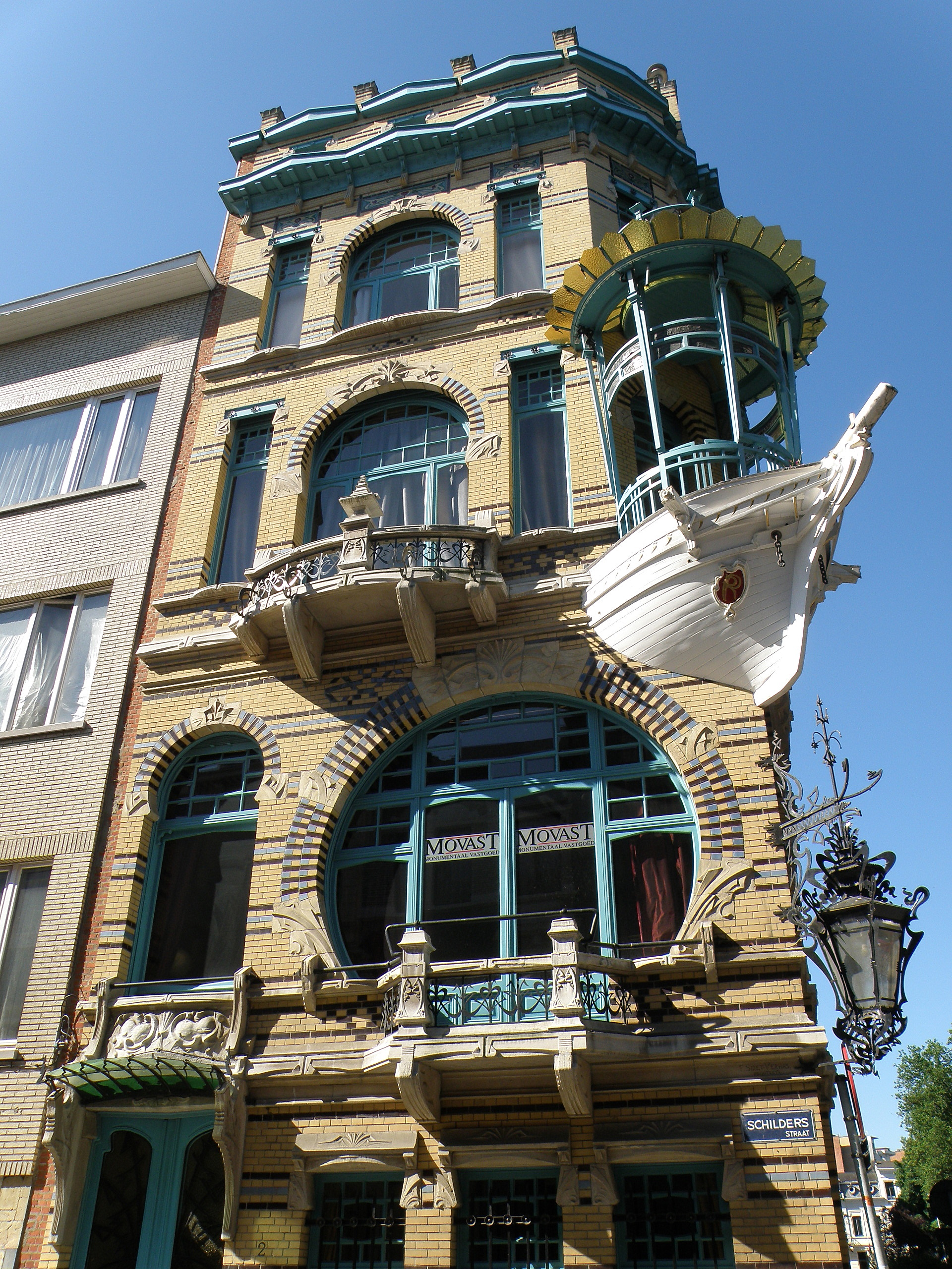 Antwerpen, district Antwerpen, wijk Zuid. Art Nouveau-huis, genaamd "'t Bootje", aan de Schildersstraat nr. 2 (hoek Schildersstraat/Plaatsnijdersstraat). Ontwerp van archit. Frans Smet-Verhas uit 1901. Vgl. verder Inventaris Bouwkundig Erfgoed.